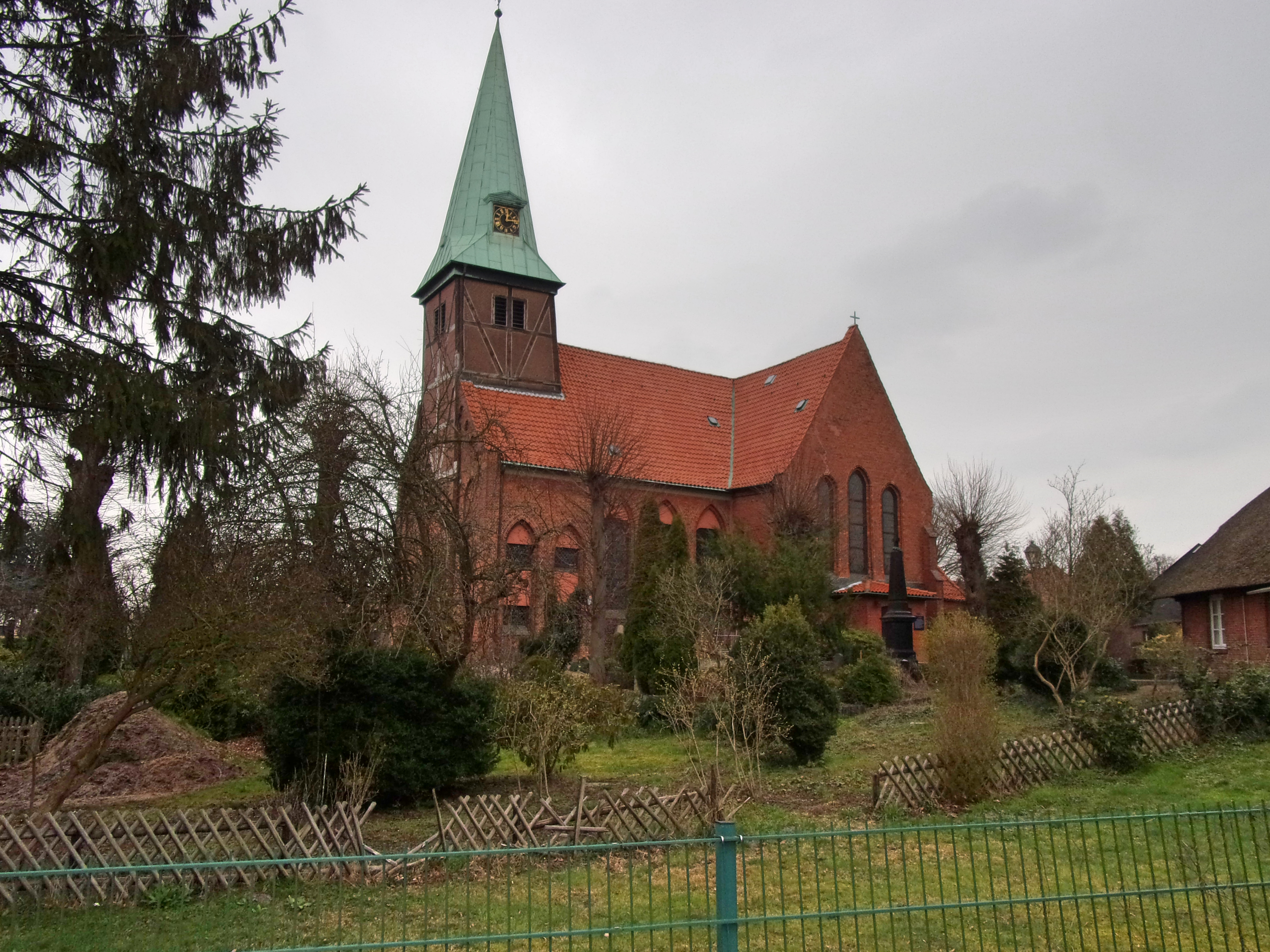 Die ev.-Luth. Kreuzkirche Kirchdorf im Stadtteil Wilhelmsburg. Die Kirche mit Friedhof befindet sich zum Schutz vor Hochwasser auf einer Düne. Die Kirche wurde 1614 als Fachwerk-Saalkirche erbaut und gehört zum Ensemble des historischen Dorfkerns Kirchdorf. This is a photograph of an architectural monument.